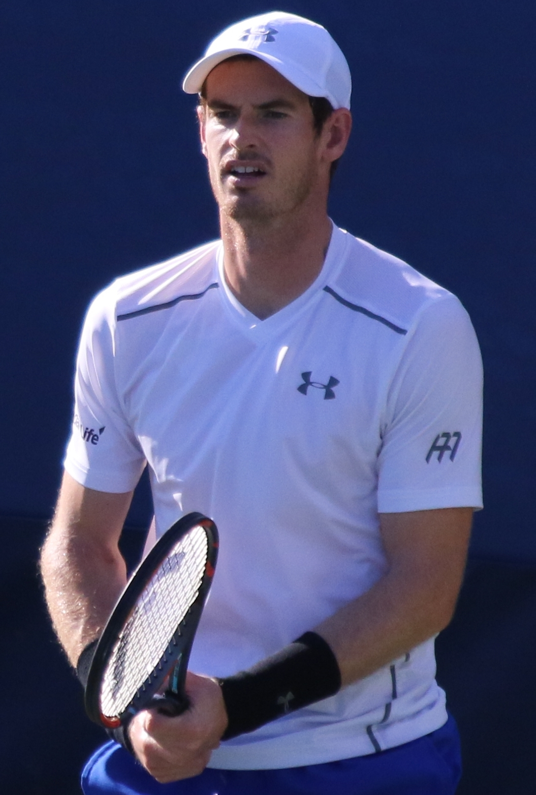 Murray A. US16 (10)